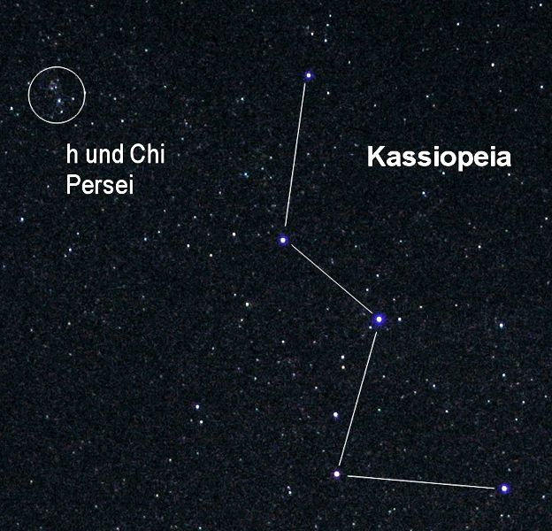 Sternbild Kassiopeia, fotografiert mit 35mm Weitwinkel, 15 Sekunden, Blende 2,0, Canon G5